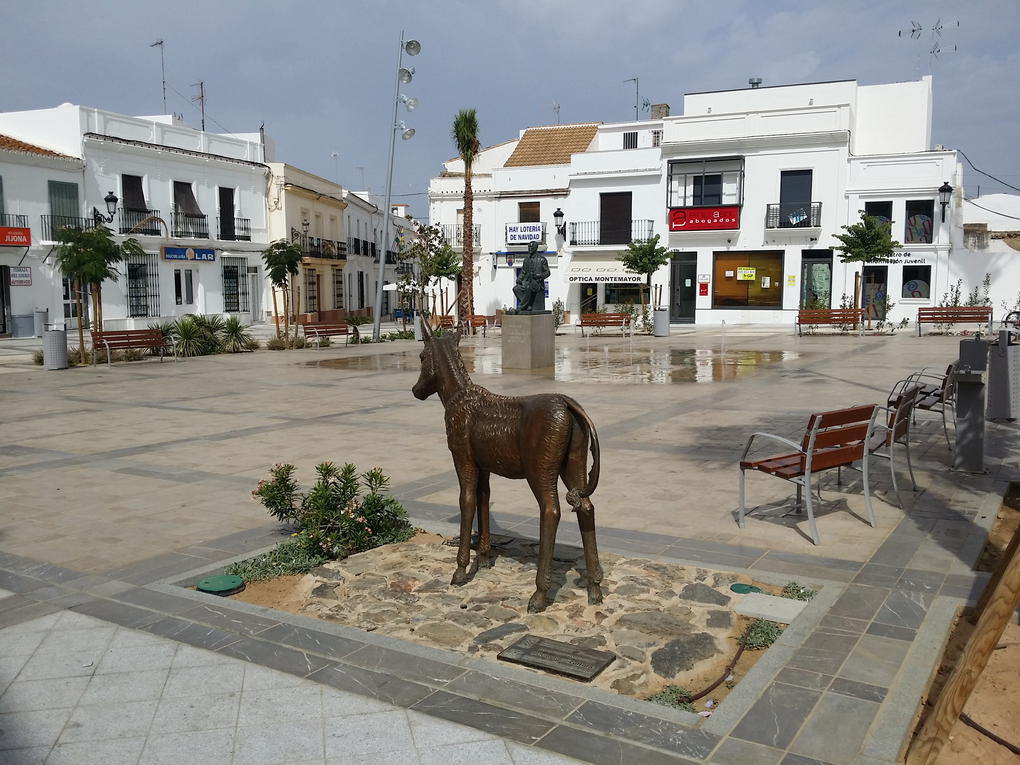 Moguer (España). Plaza del Cabildo con las esculturas de Platero y Juan Ramón Jiménez.